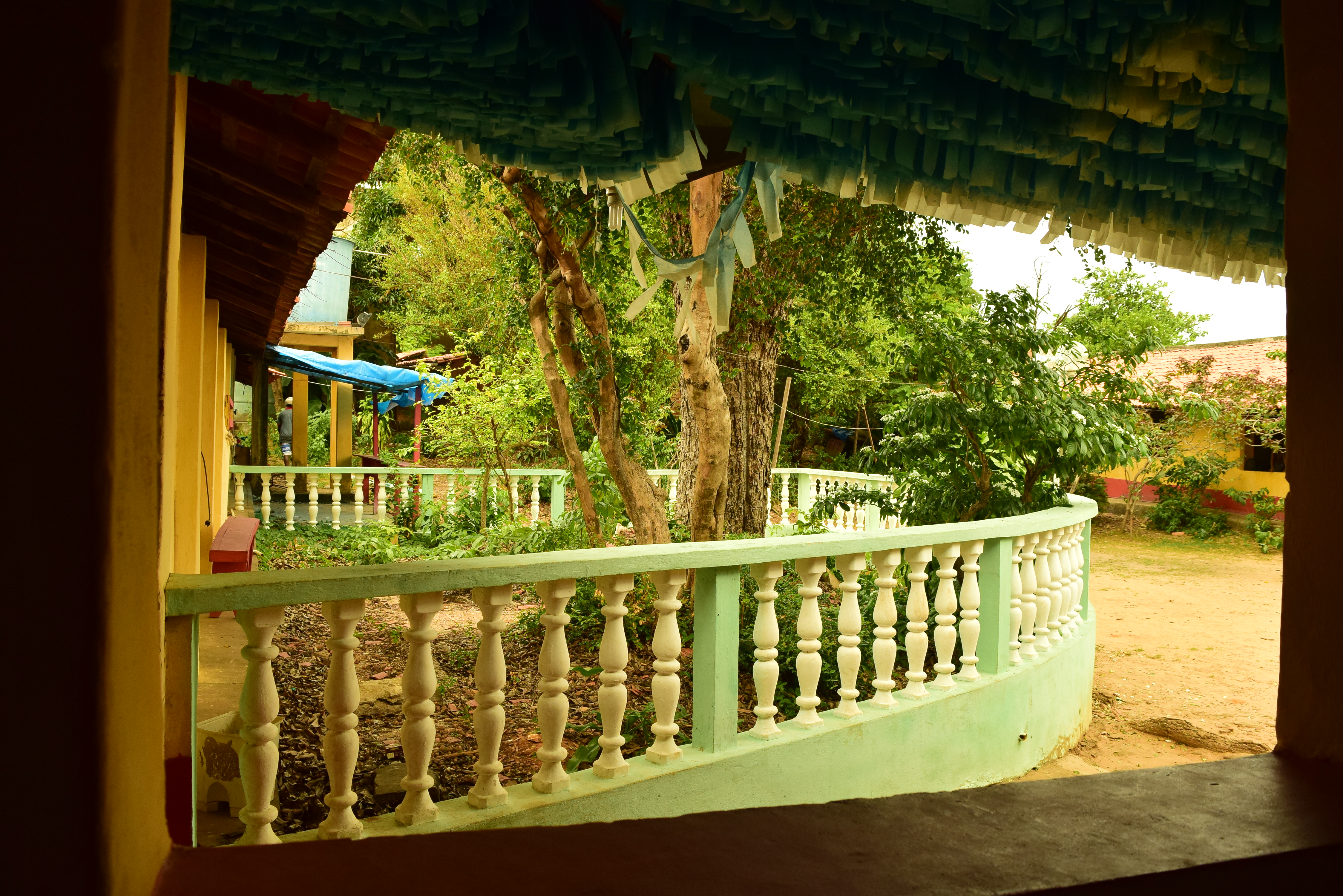 Terreiro Casa das Minas Jeje, situado na Rua de São Pantaleão nº 857 e 857A.